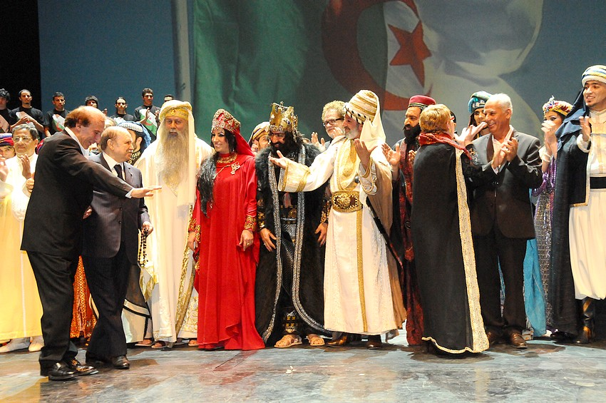 Algerian President Abdelaziz Bouteflika inaugurated the Tlemcen international cultural event. الرئيس الجزائري عبدالعزيز بوتفليقة يفتتح الحدث الثقافي الدولي في تلمسان Le Président algérien Abdelaziz Bouteflika a inauguré la manifestation culturelle internationale à Tlemcen.